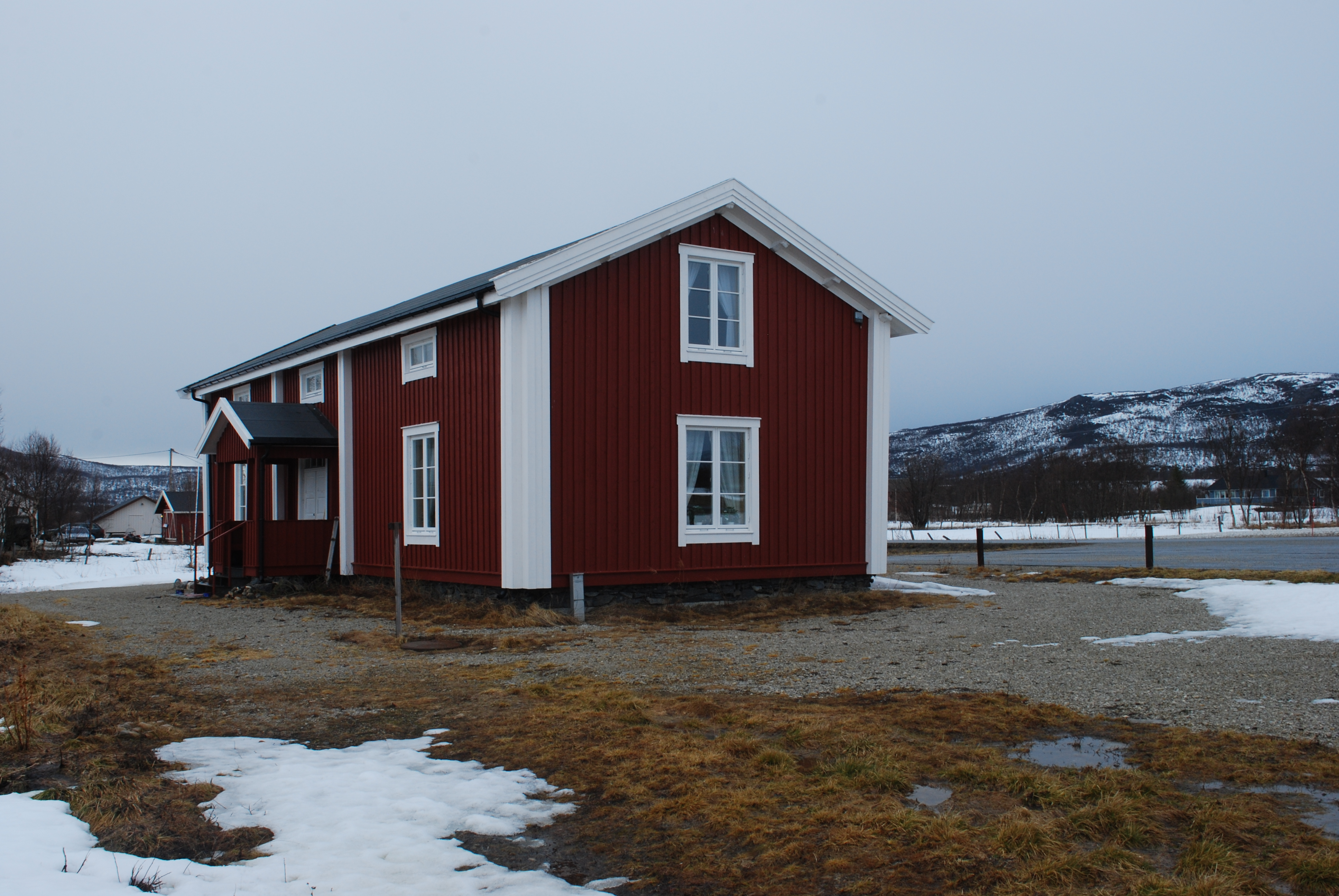 Den gamle bygningen ved Kventunet, Børselv, Porsanger kommune, Finnmark